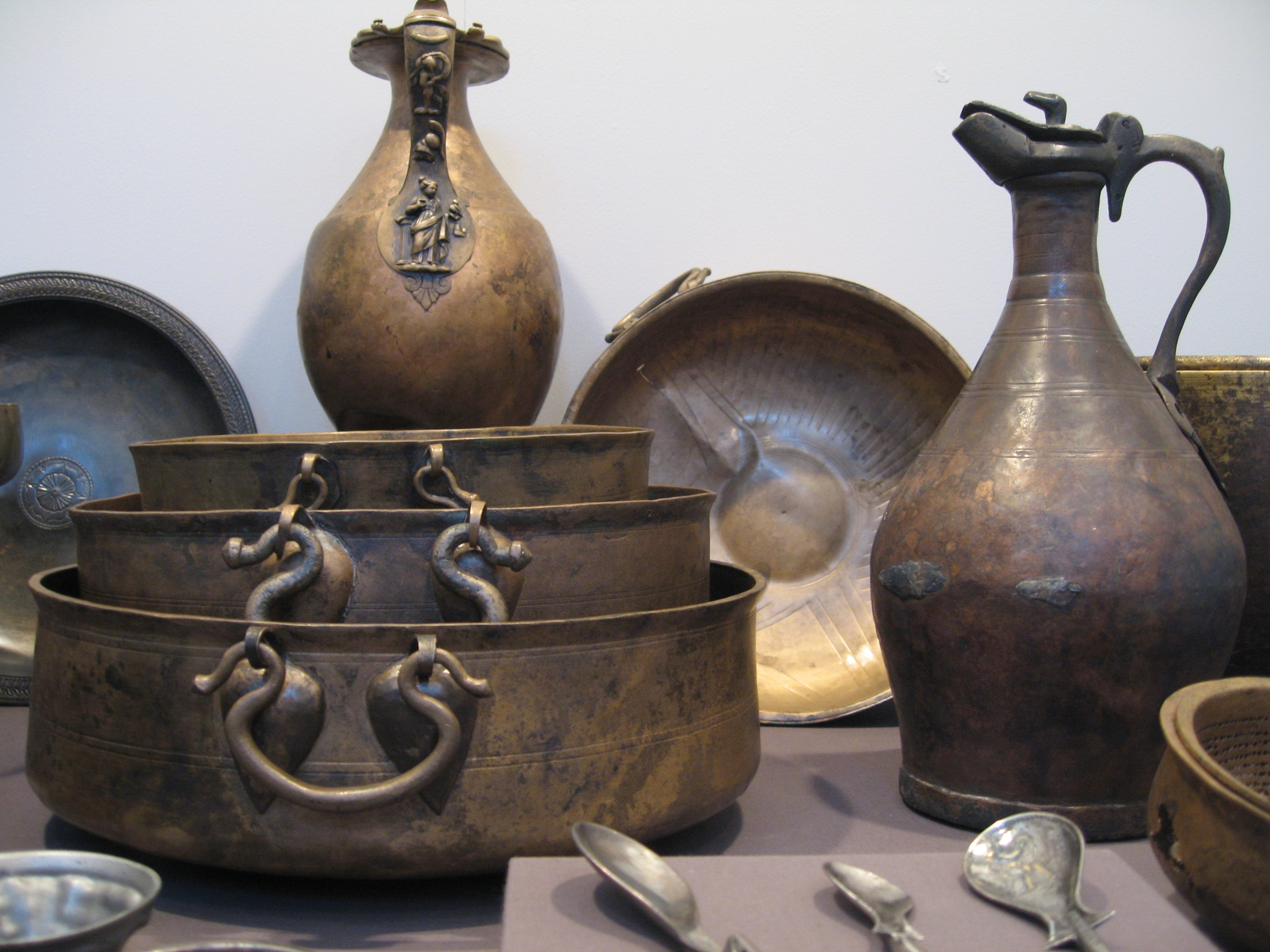 Tafelgeschirr aus Neupotz